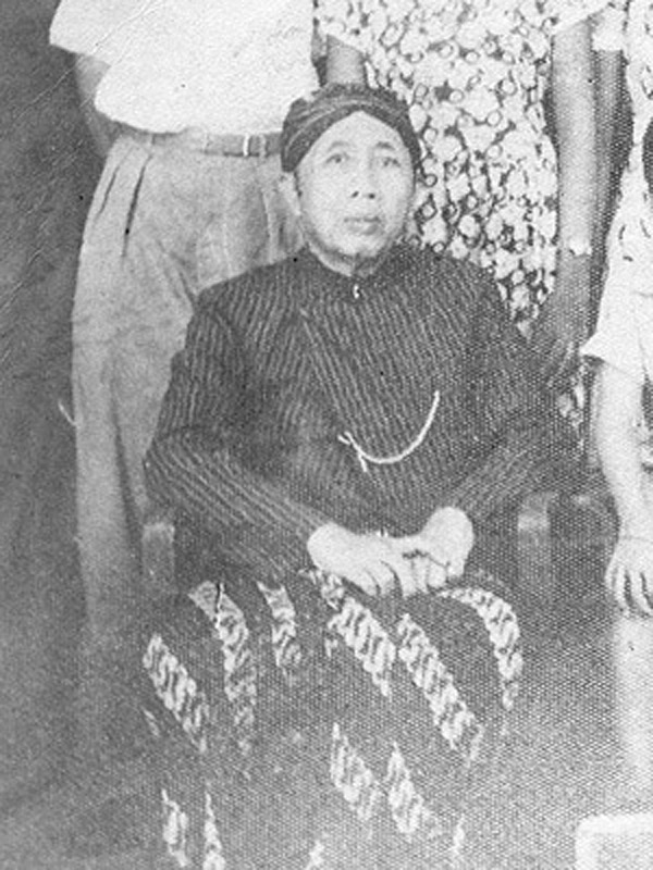 Minhadjurrahman Djojosoegito, in Yogyakarta, 1957